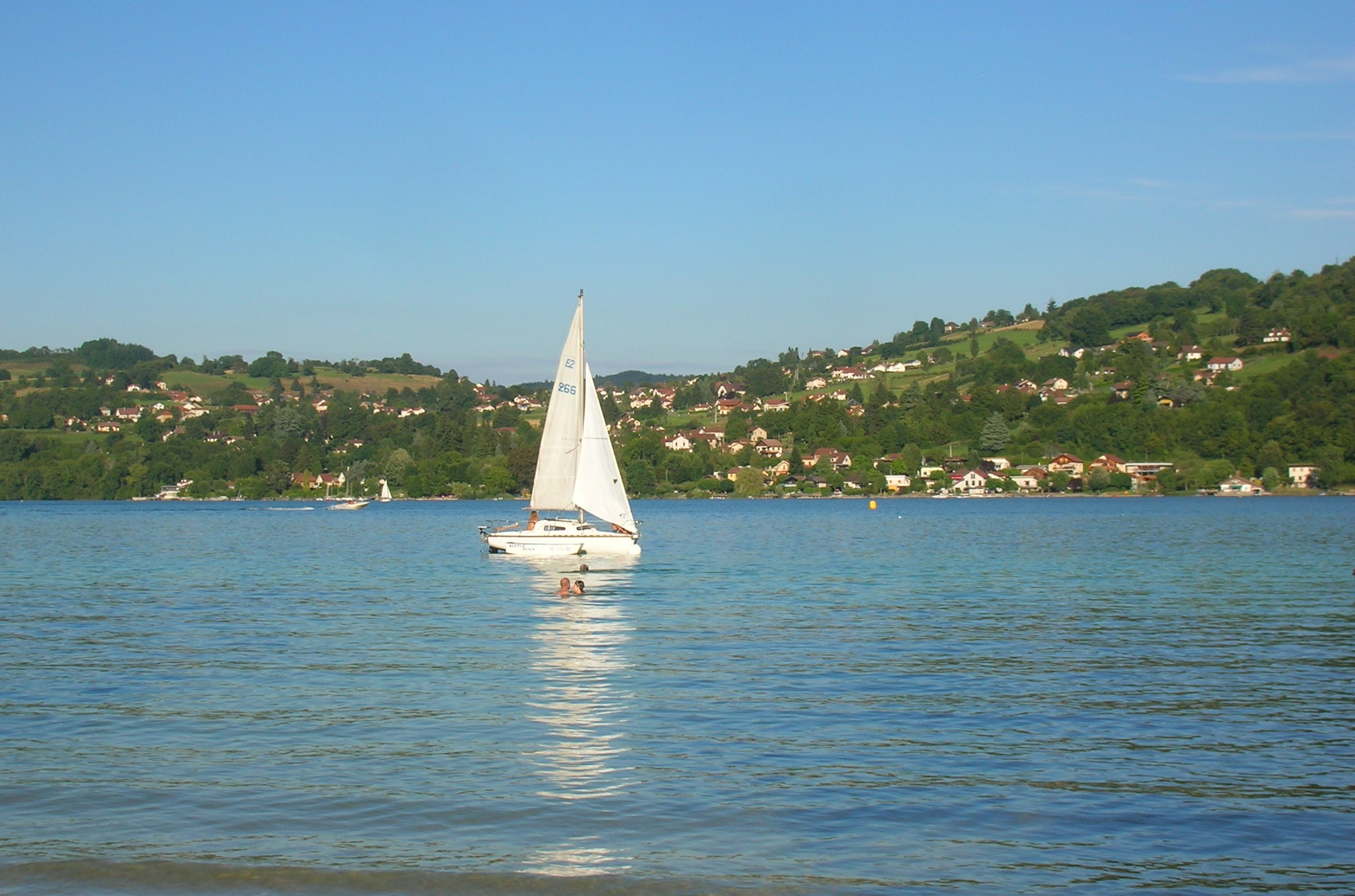 Bilieu depuis le Yacht Club Grenoble Charavines - Base Nautique Lac de Paladru. Isère, AuRA, France.